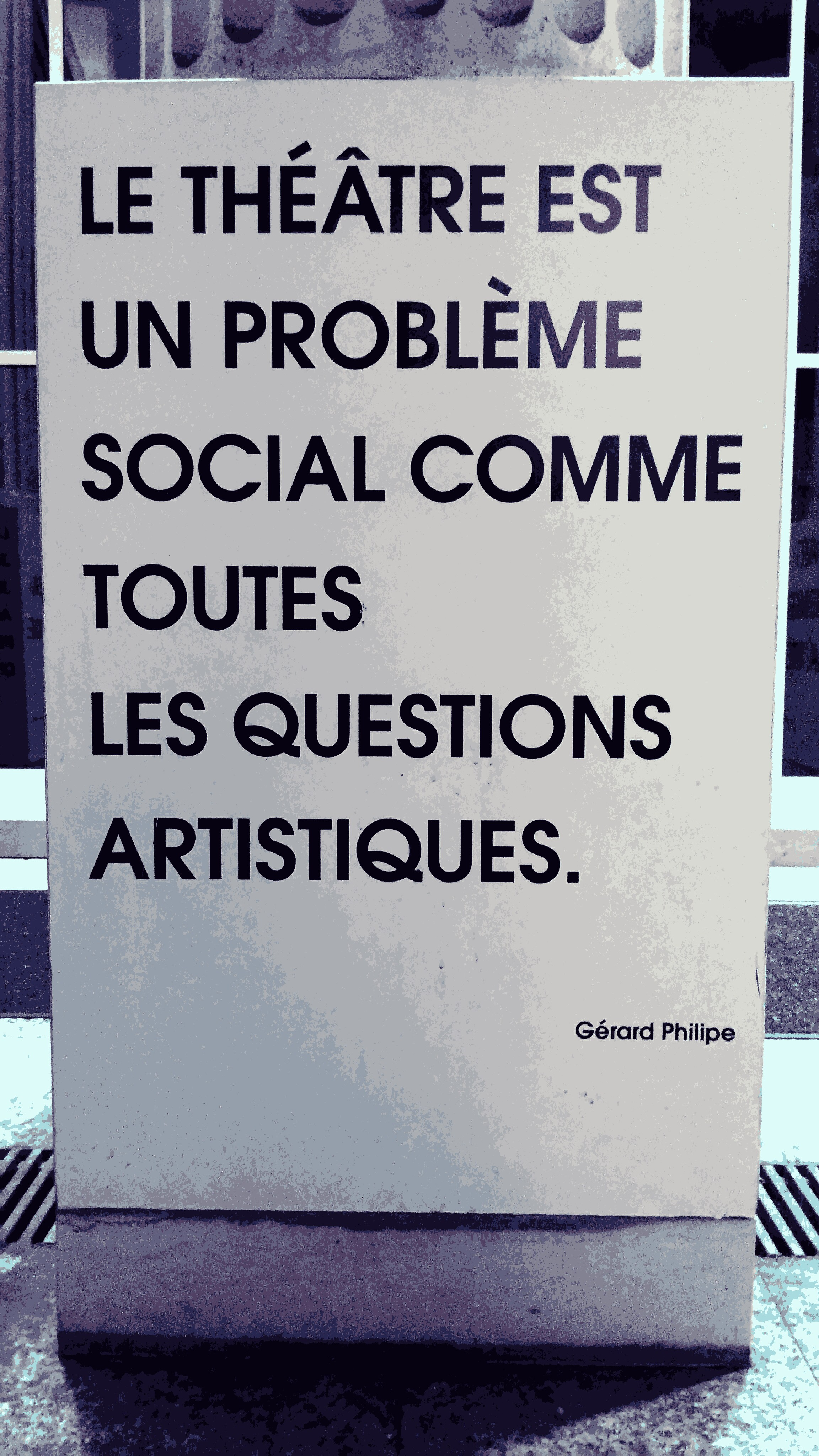 Citation de Gérard Philipe sur une colonne du Théâtre des Abbesses, situé aux pieds de la butte Montmartre à Paris, 18e arrondissement (Travail personnel)